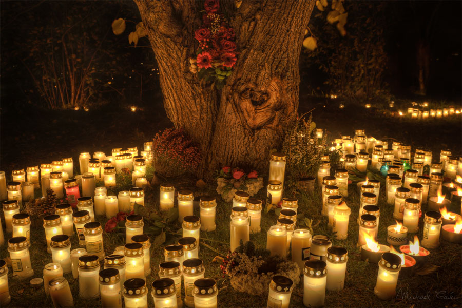 Alla Helgona or Halloween at Skogskyrkogården in Stockholm, Sweden.